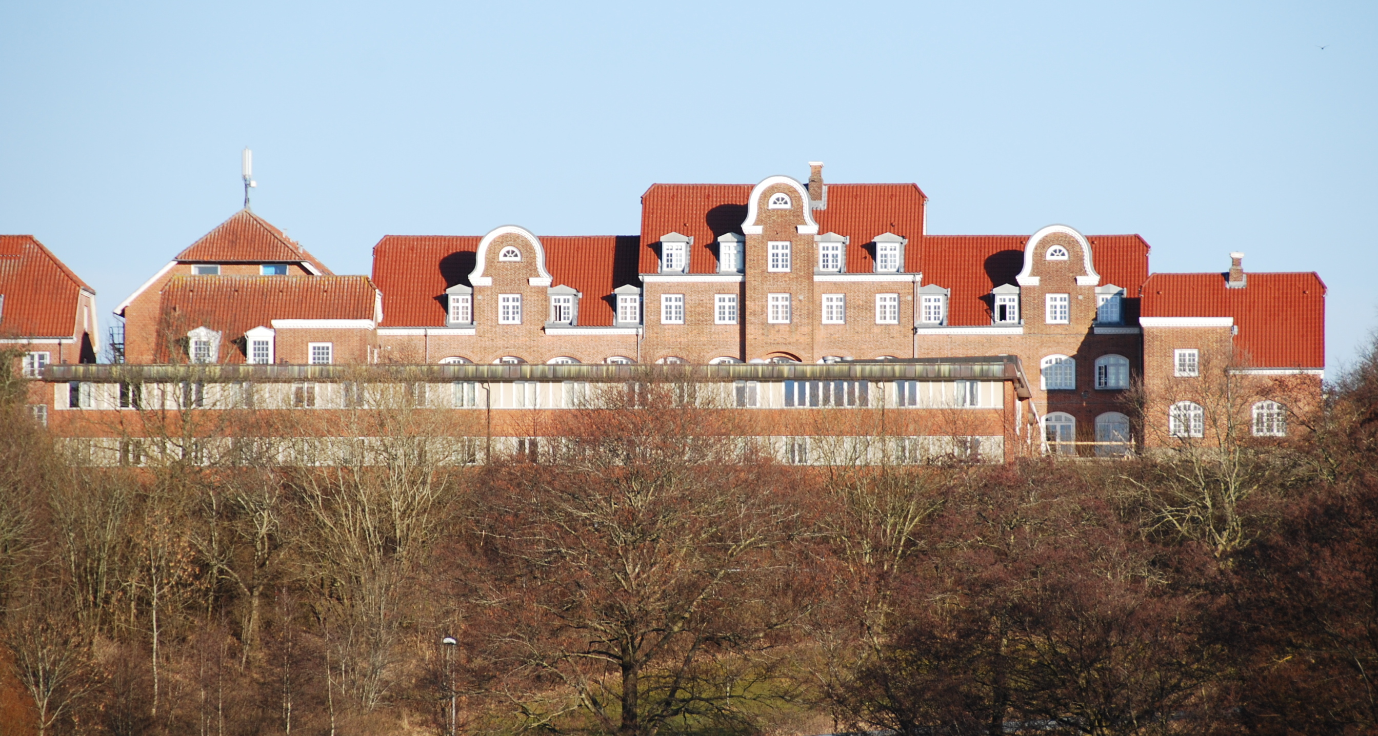 Asmildkloster Landsbrugsskole, set fra Salonsøen ved Borgvold i Viborg.